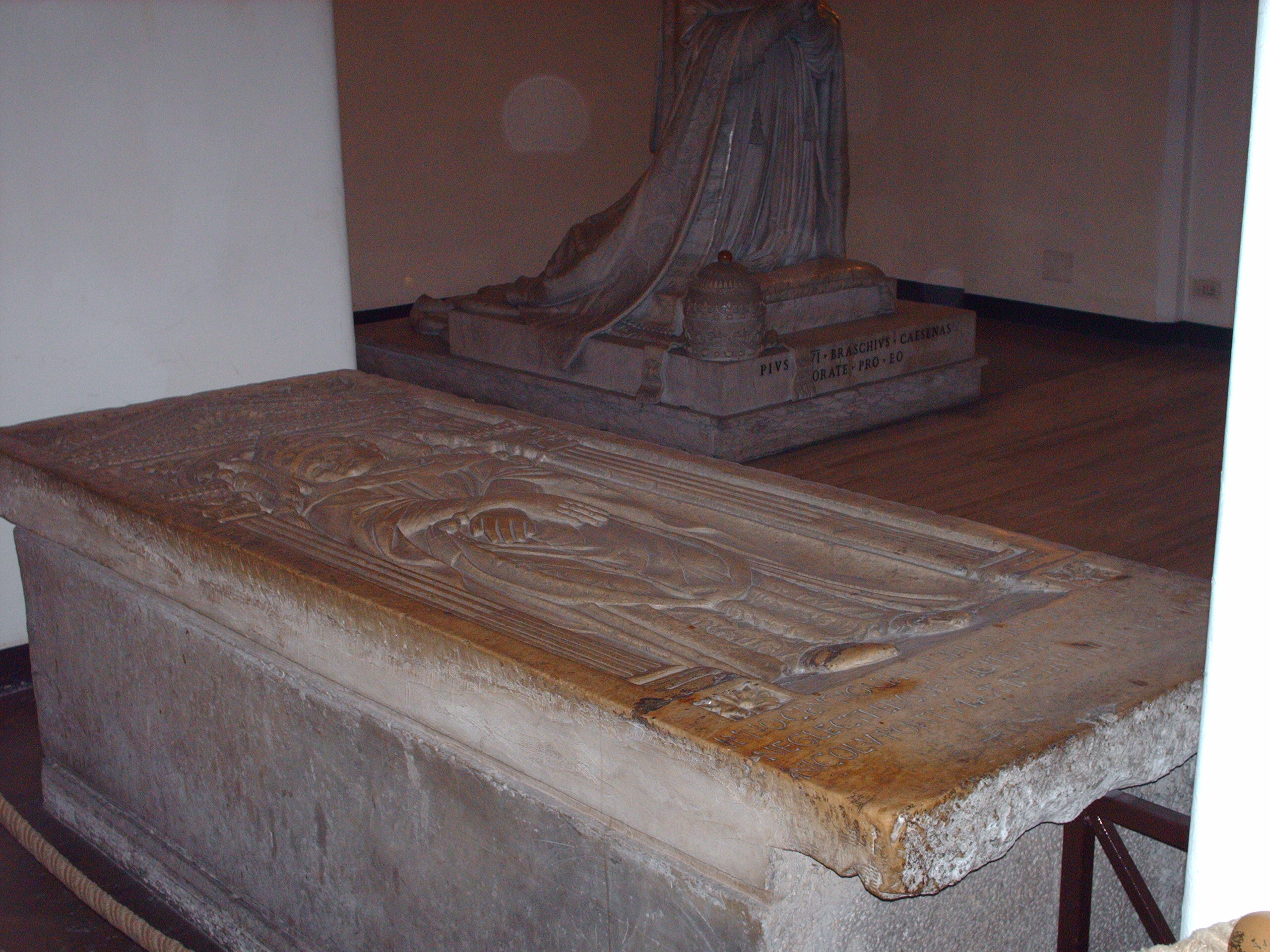 Tomb of Pope Innocent VII, under Basilica di San Pietro